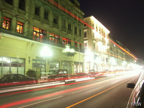 Wilhelmstraße Wiesbadenben éjszaka